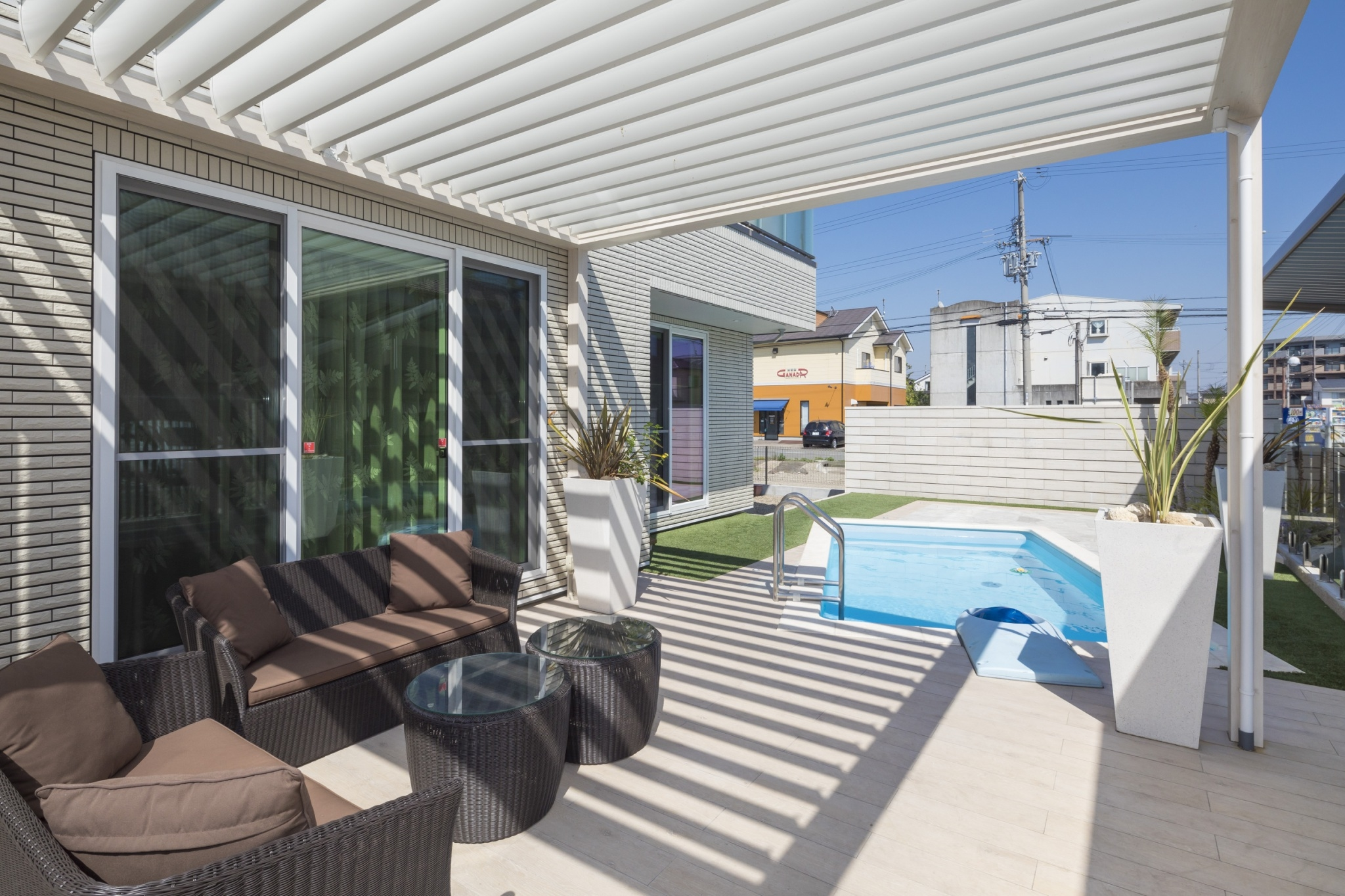 Outdoor living アウトドアリビング設置例 contractor.： Himawari Life Co., Ltd.（ひまわりライフ）